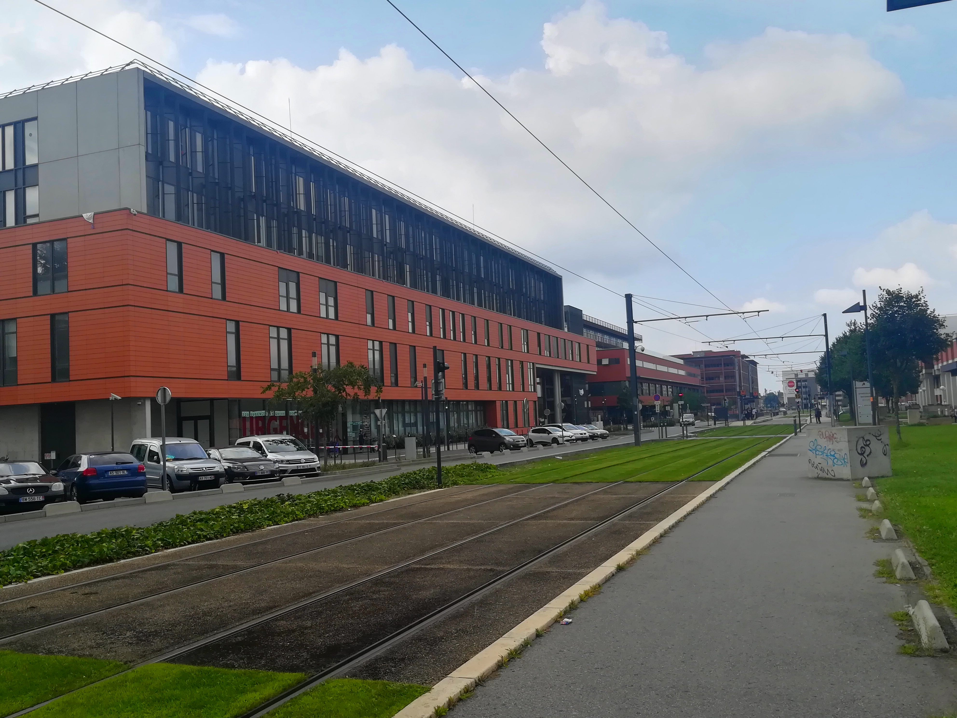 L'artère principale avec le tramway du site hospitalier de Purpan.